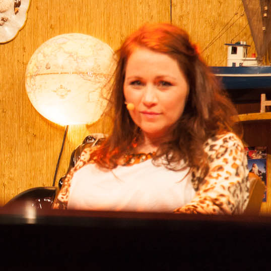 Nordiske Mediedager 2013